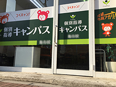 個別指導キャンパス 玄関前